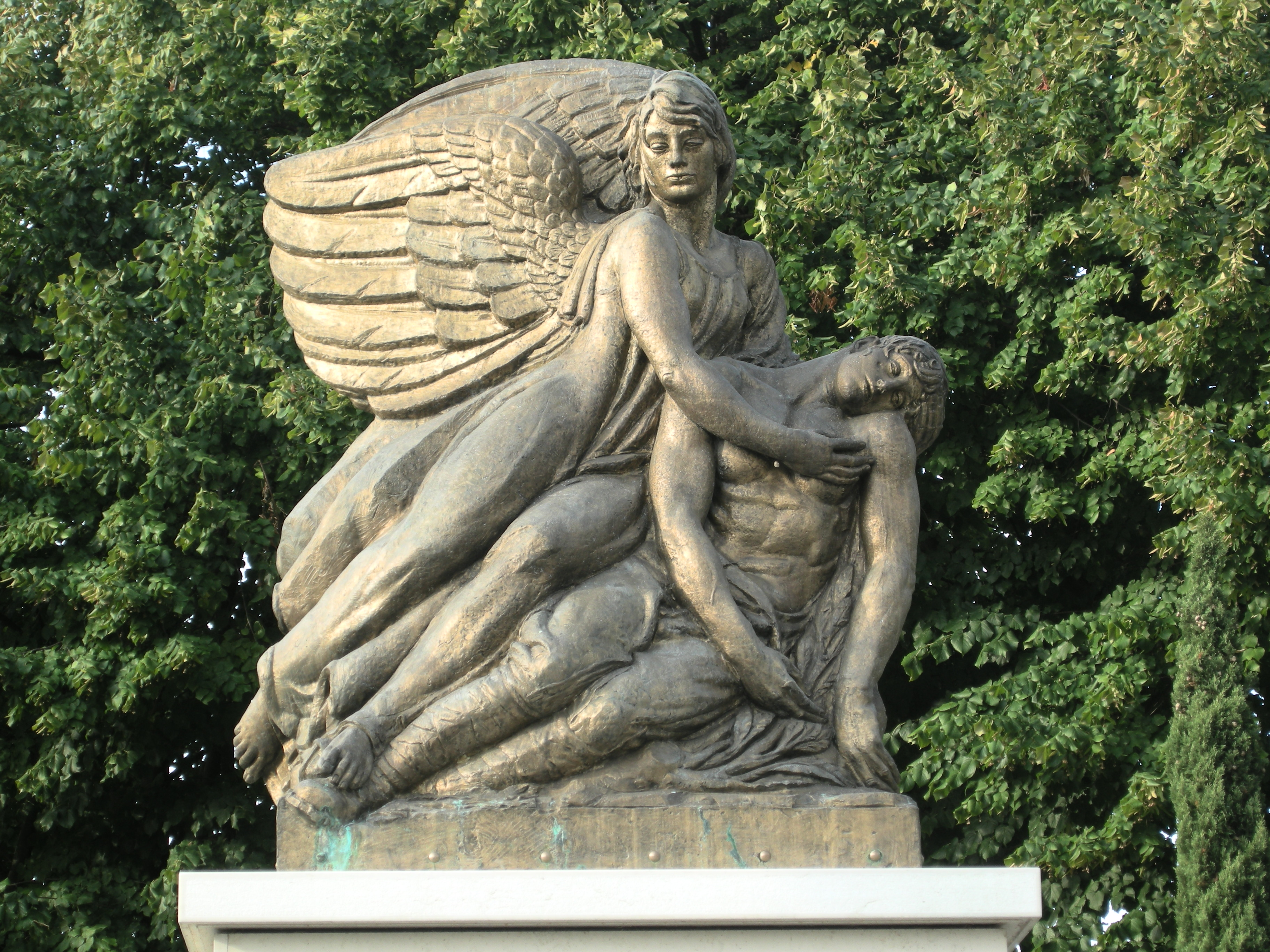 Cervellin, opera propria, monumento ai caduti Roncade TV Itali, lic. GFDL, data 05.09.2009